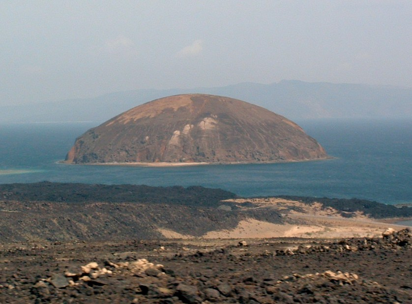 Ancien volcan dit Guinni Kôma (l'île au Diable), dans le Ghoubbet-el-Kharab (Gouffre des Démons), en République de Djibouti.